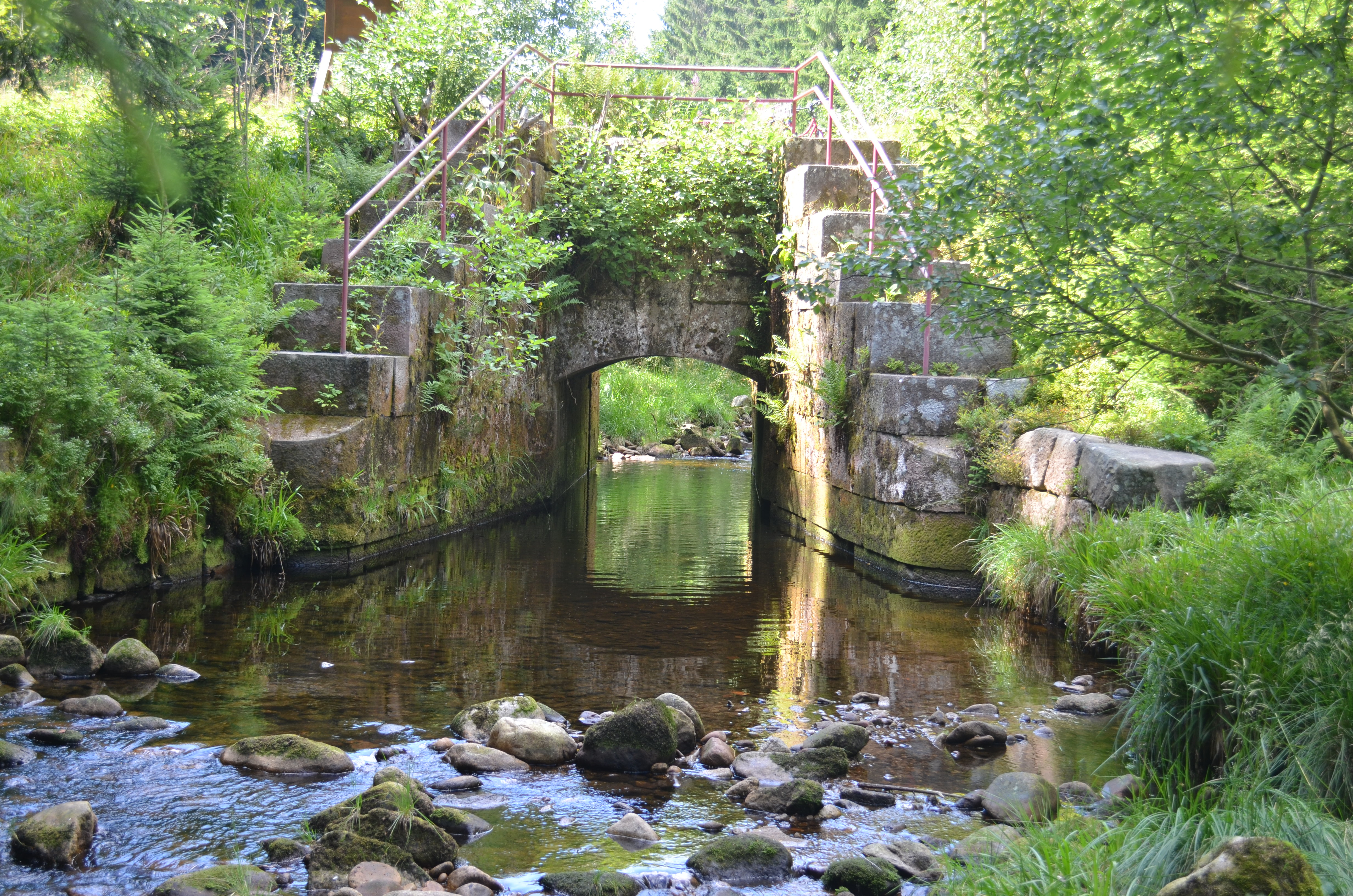 Hundsbach, Biberacher Schwallung (Herzogschwallung): Einrichtung zum Aufstauen der Biberach und Triften von Holz aus dem 19. Jahrhundert